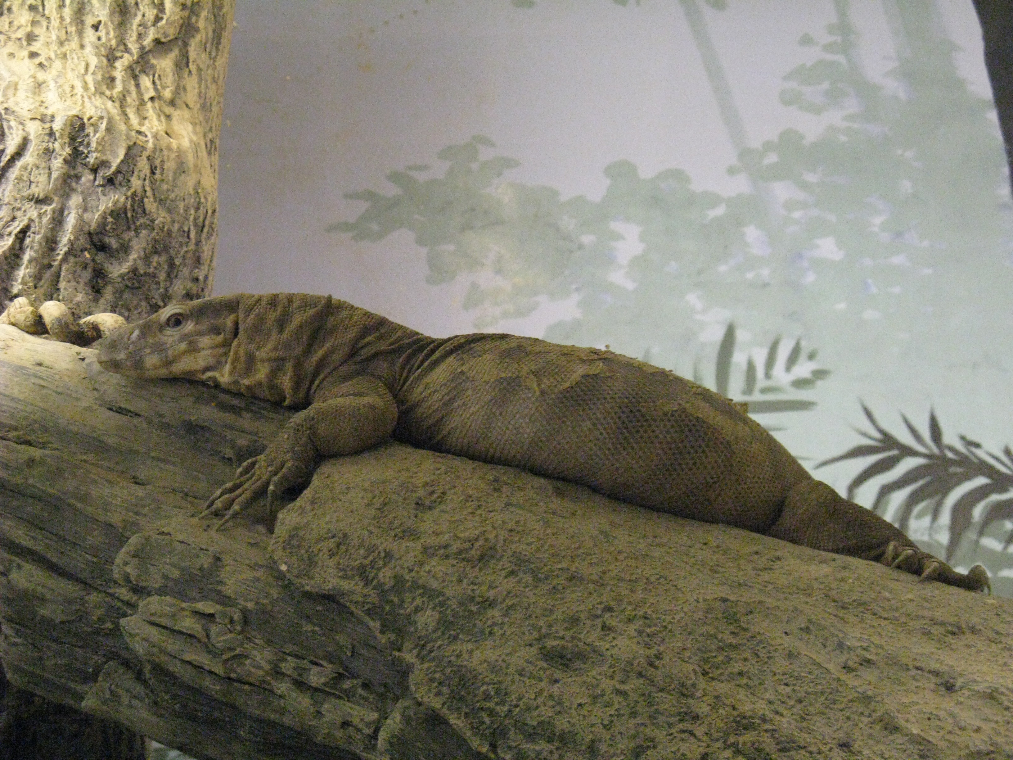 Scientific name Varanus flavescens